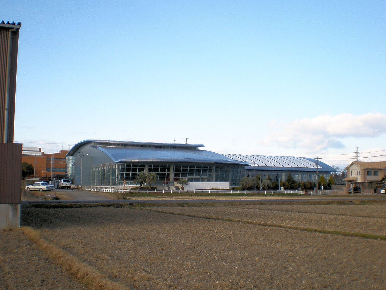 愛知県春日井市にあるサンフロッグ春日井（春日井市温水プール）